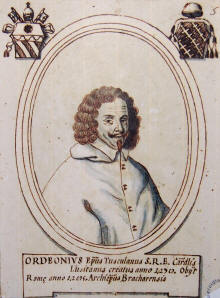 Cardeal Ordonho Alvares